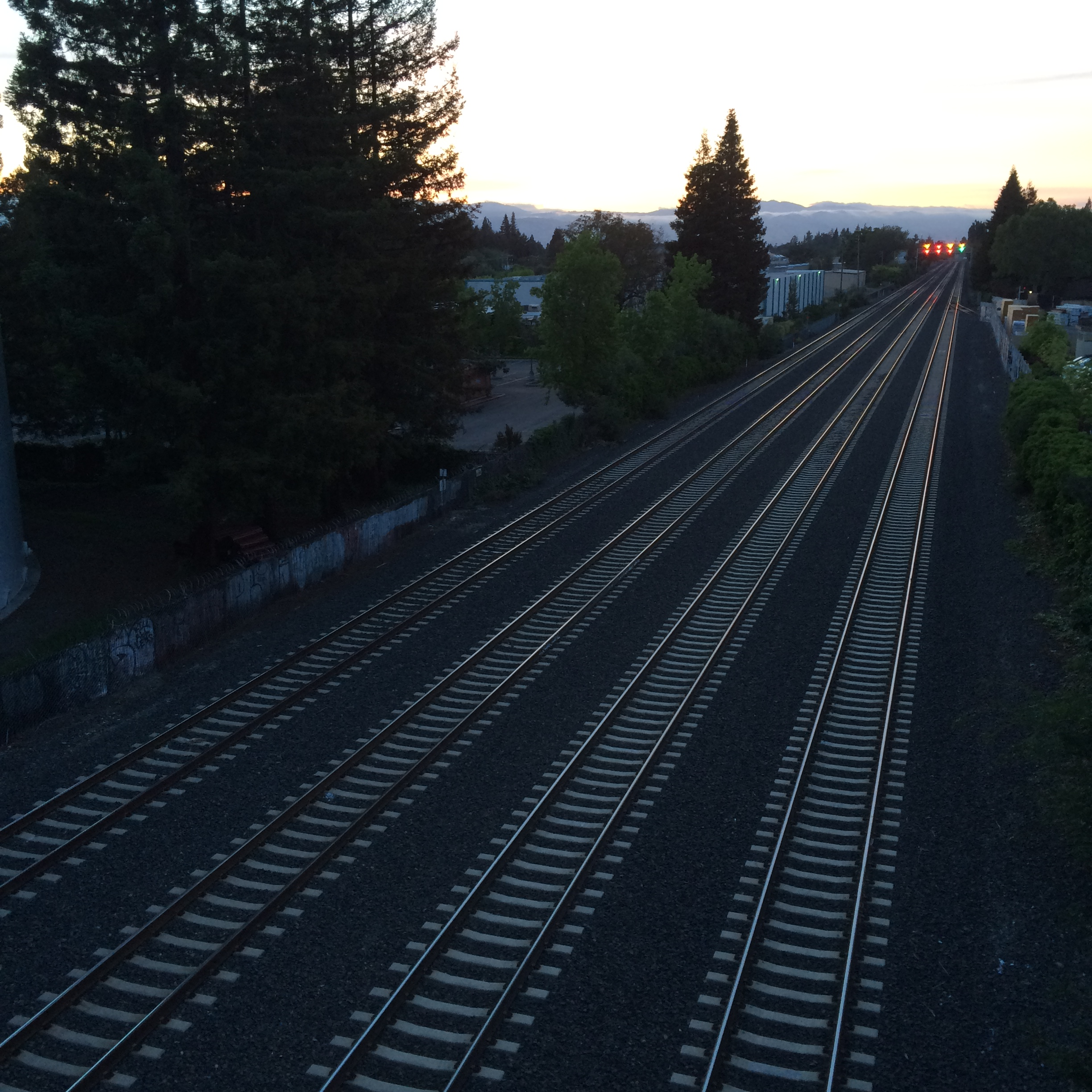 Sunnyvale four tracks